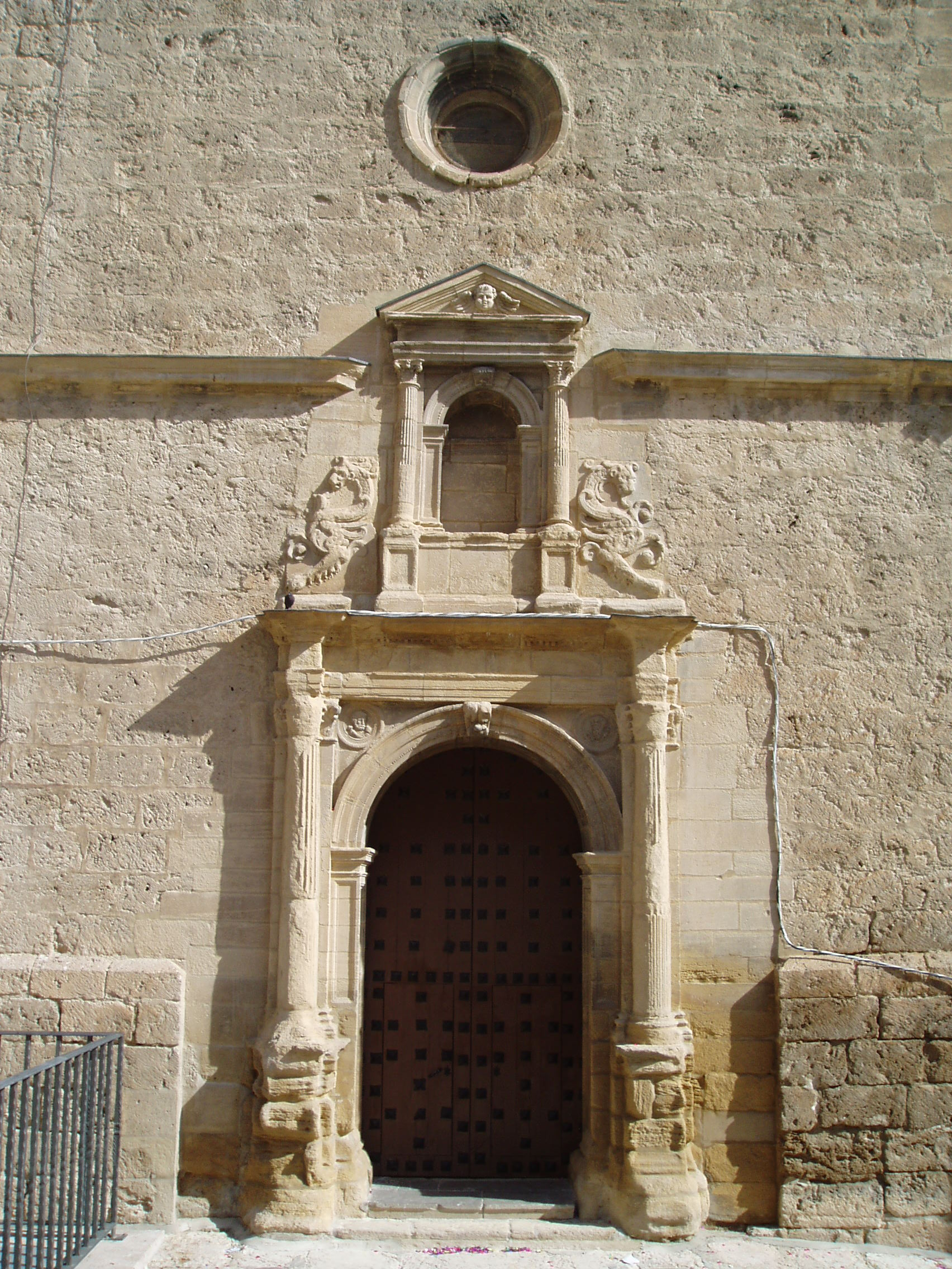 Portada renacentista de la Iglesia de San Gabriel, en Loja (Granada). Templo del siglo XVI declarado Monumento Histórico Nacional en 1991. Se trata de una de las obras más trascendentes de la arquitectura renacentista granadina por las novedades que presenta, iniciando la etapa más original y expresiva de nuestro clasicismo. Según la tradición Diego de Siloé fue su tracista, aunque otras fuentes señalan hacia su discípulo Juan de Maeda. En su interior destaca su amplia nave con capillas laterales. También es digno de señalar, su cabecera por su monumentalidad. Cuenta con una bóveda baída en la que se incluyen tres anillos concéntricos con bustos en relieve de los apóstoles. Más hacia el centro aparecen rosetas con bustos de una joven pareja y otro dos ancianos con barba. El siguiente anillo incluye cabezas de angelitos y el último un relieve de Dios-Padre. La portada principal es de 1566 y tiene dobles columnas jónicas sobre pedestales independientes. El arco incorpora en sus enjuntas ángeles engalados que sostienen el escudo del arzobispo Guerrero. En la hornacina central aparece el grupo escultórico de la Encarnación y sobre el mismo un fronton triangular con el escudo imperial.